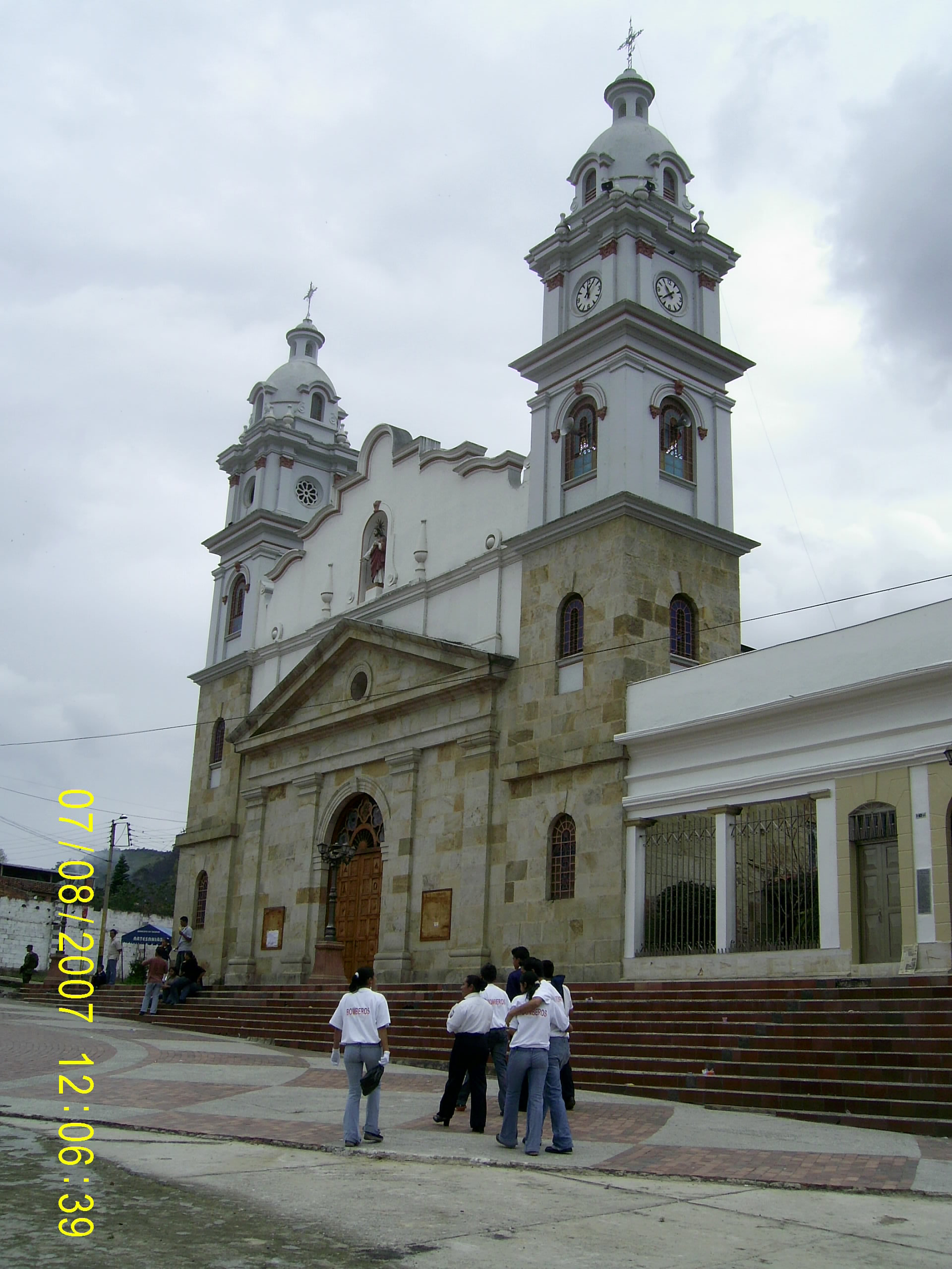 Iglesia Choachi, Cundinamarca